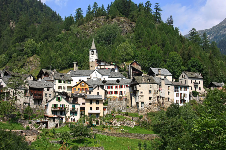 Panorama di Fusio, frazione del comune di Lavizzara, TI-CH